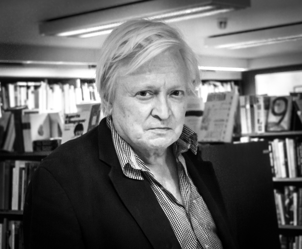 Författaren Stig Larsson på Rönnells antikvariat i Stockholm i samband med en föreläsningskväll med journalisten/författaren Cyril Hellman för att diskutera litteratur, författande och deras verk den 27 augusti 2018.